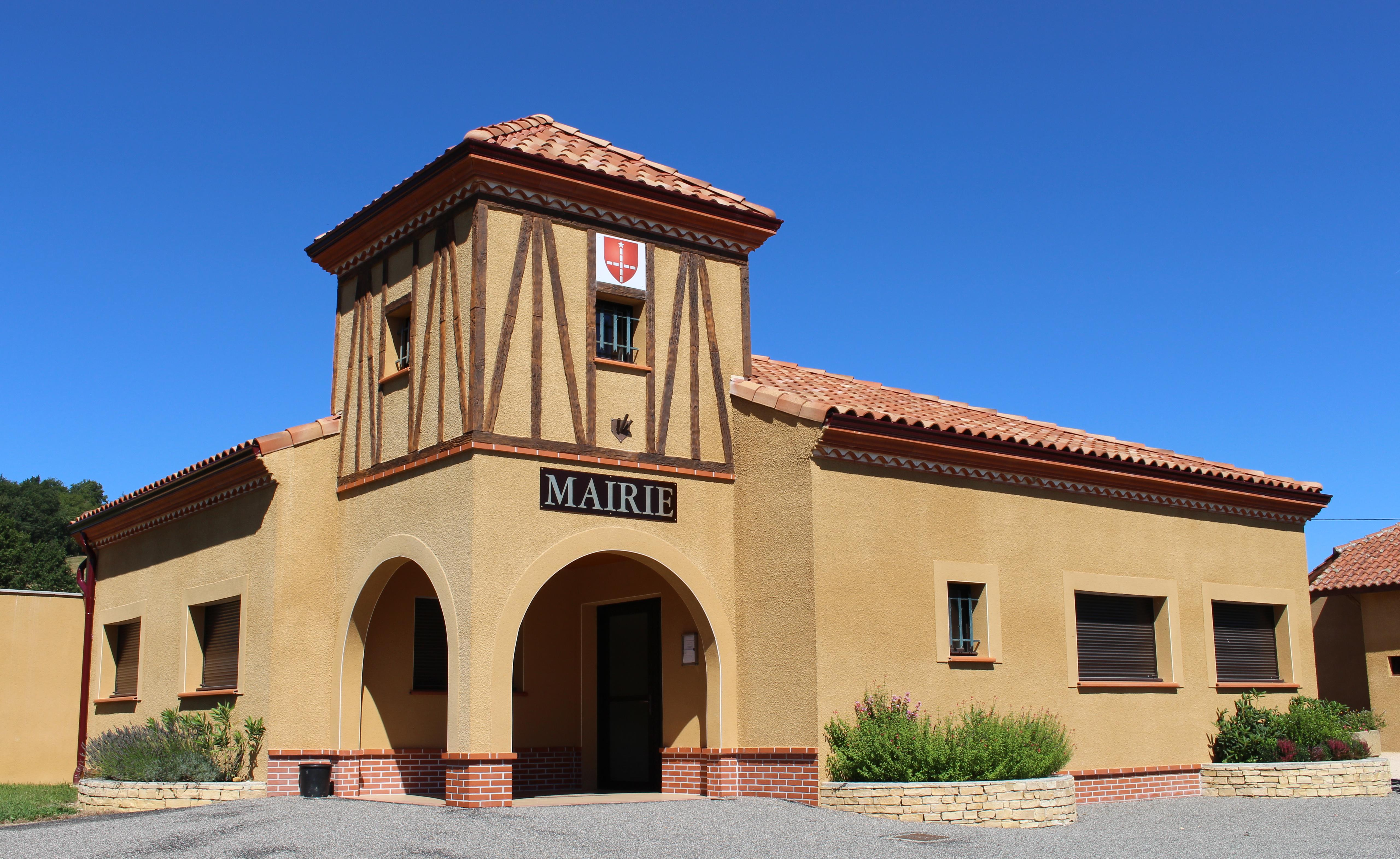 Mairie de Cizos (Hautes-Pyrénées)